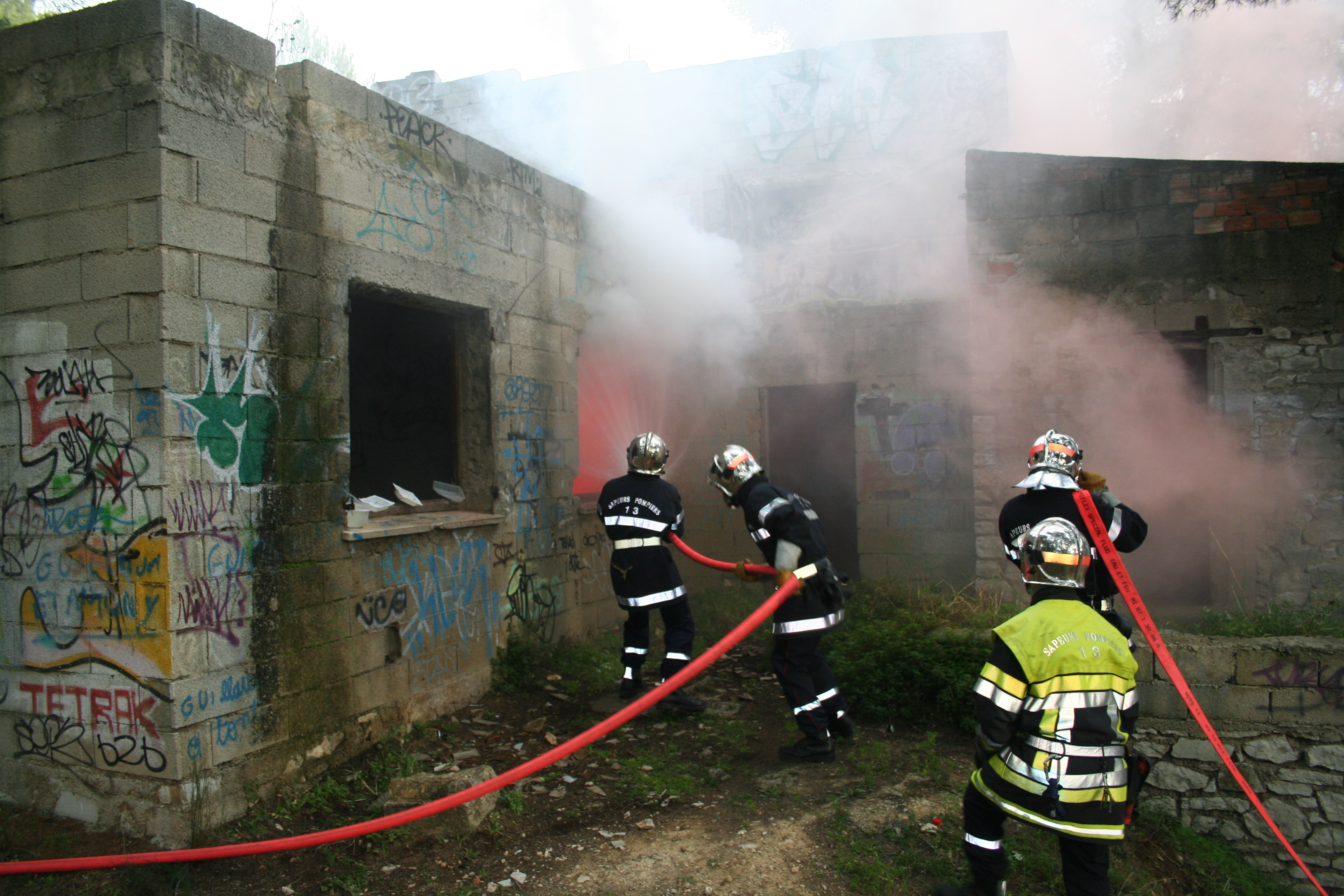 Entraînement des sapeur-pompiers français (SDIS 13) sur un feu d'habitations